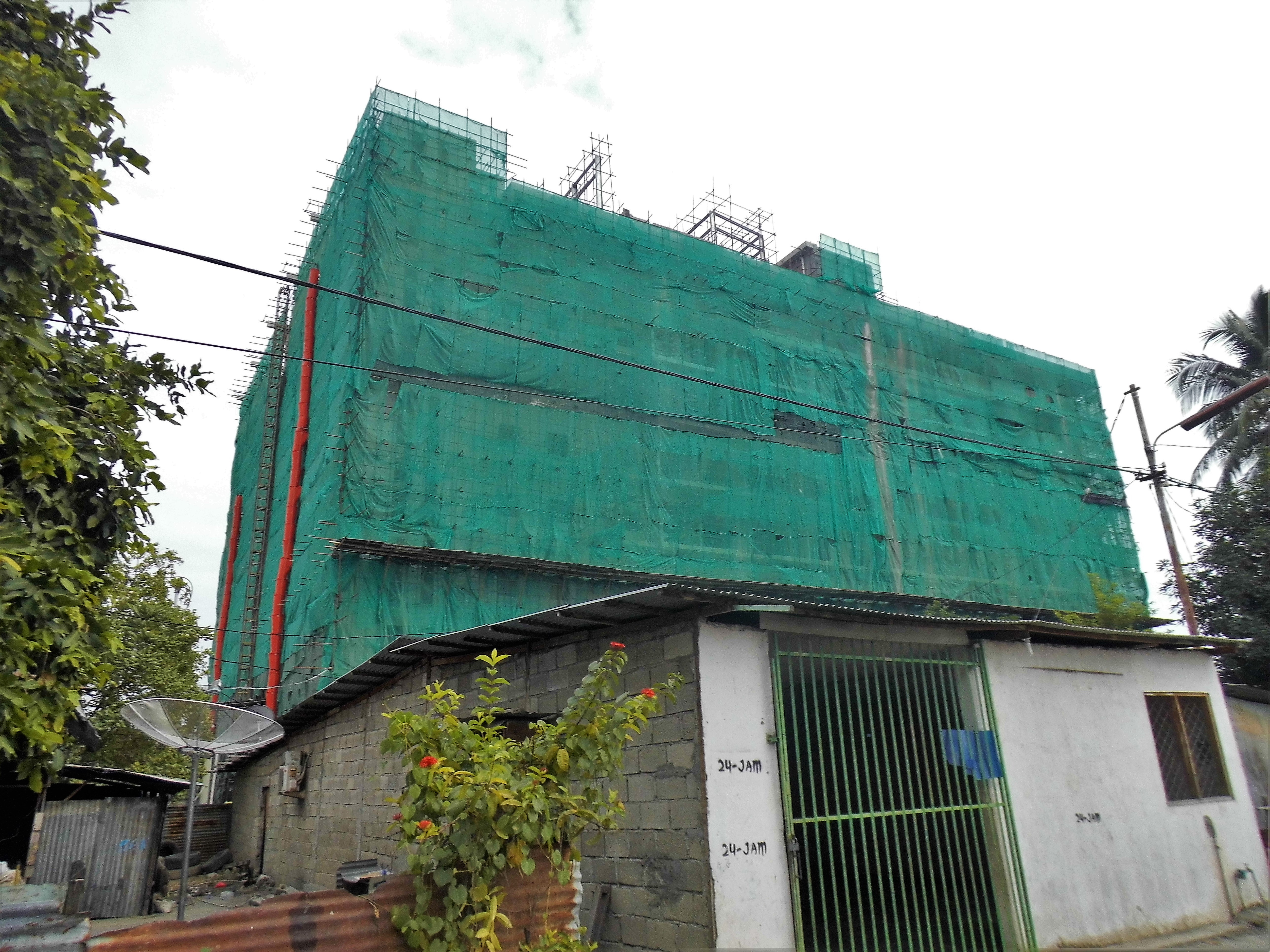 Rua de Manu Tafui, Hilton Palm Spring Estate, Fatuhada, Dili